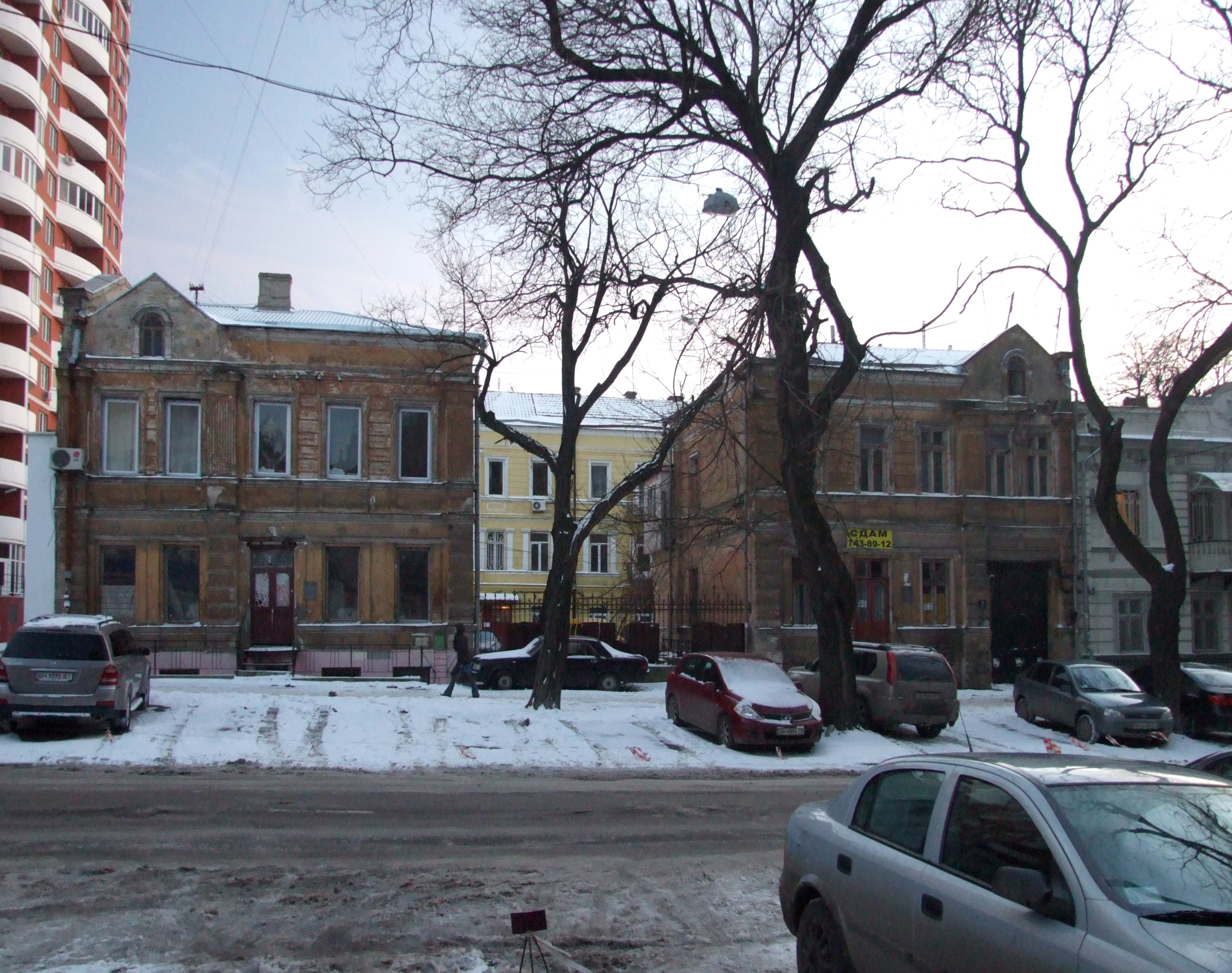 Комплекс житлових будинків Міроненка, в якому у 1900 – 1925 роках жила Л.Г. Бать - письменниця, критик, перекладач.